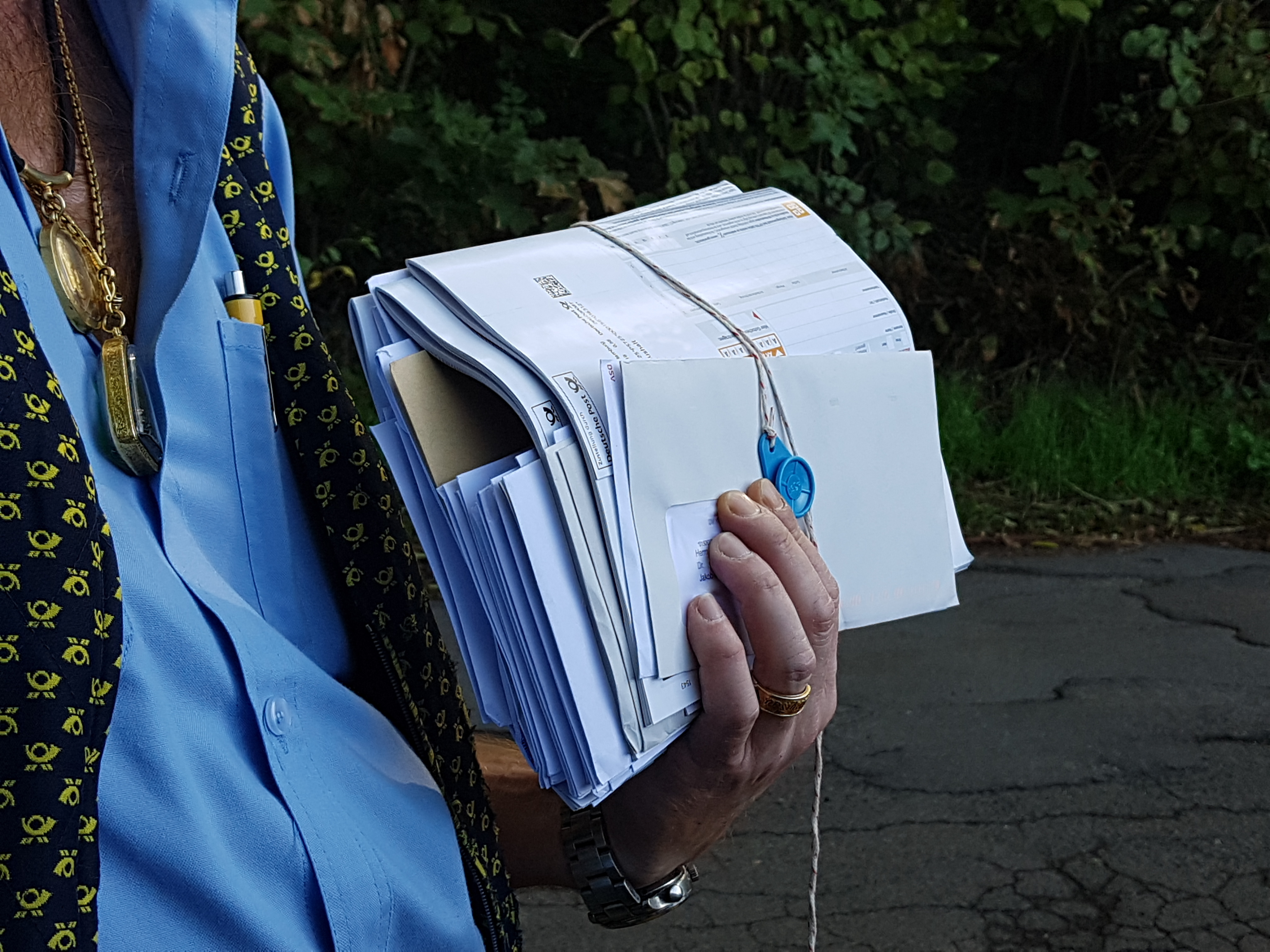 Die Menge an Briefen, die ein Briefträger im Verlauf seines Zustellganges zu verteilen hat, gliedert er sich üblicherweise vor Beginn seines Ganges in handliche Briefbunde, welche er geeignet zusammenschnürt, beispielsweise mit der hier zu sehenden blauen Bundschließe.